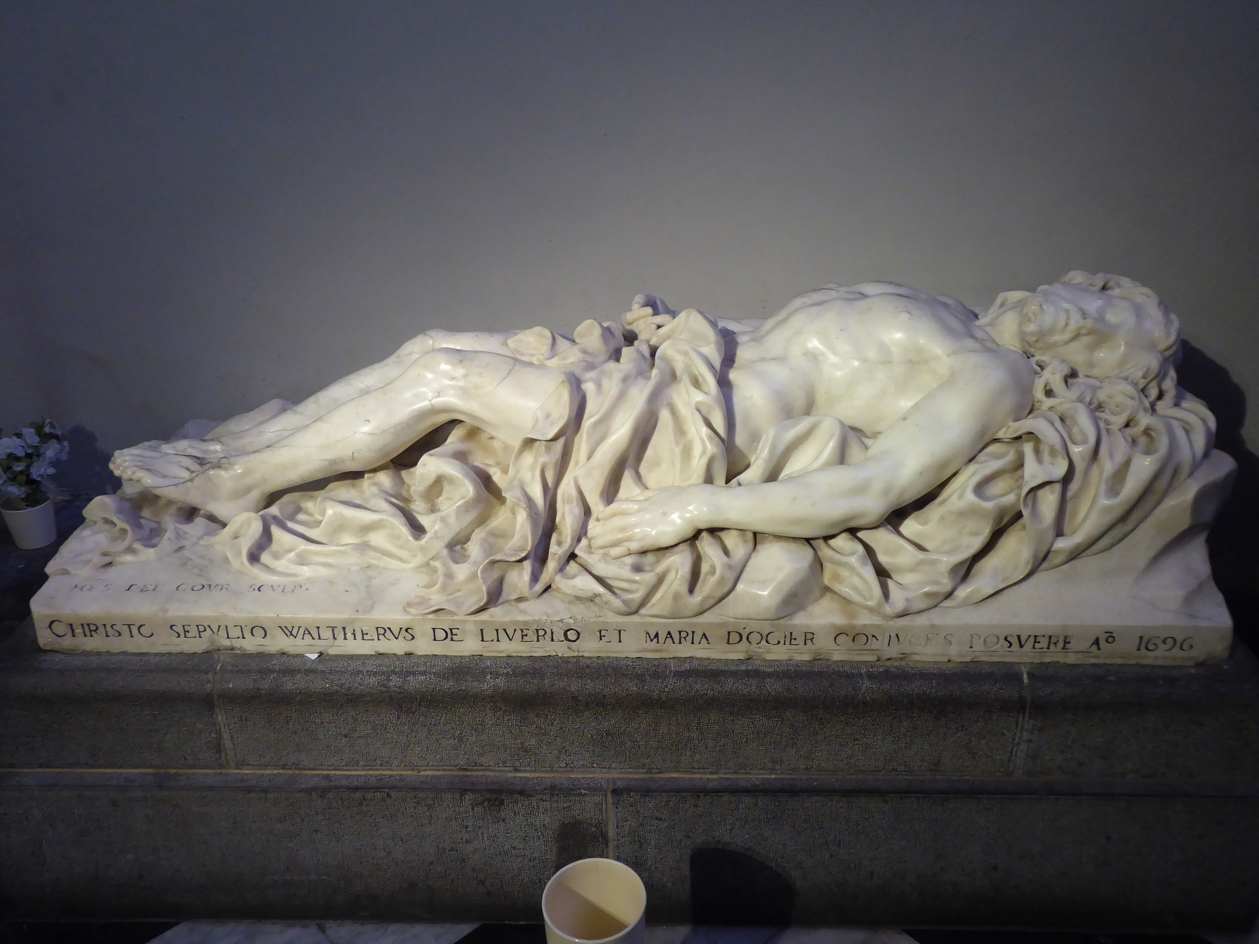 Sculpture réalisée en 1696 par Jean Delcour. Classé comme trésor de la Communauté Française le 26 mars 2010.